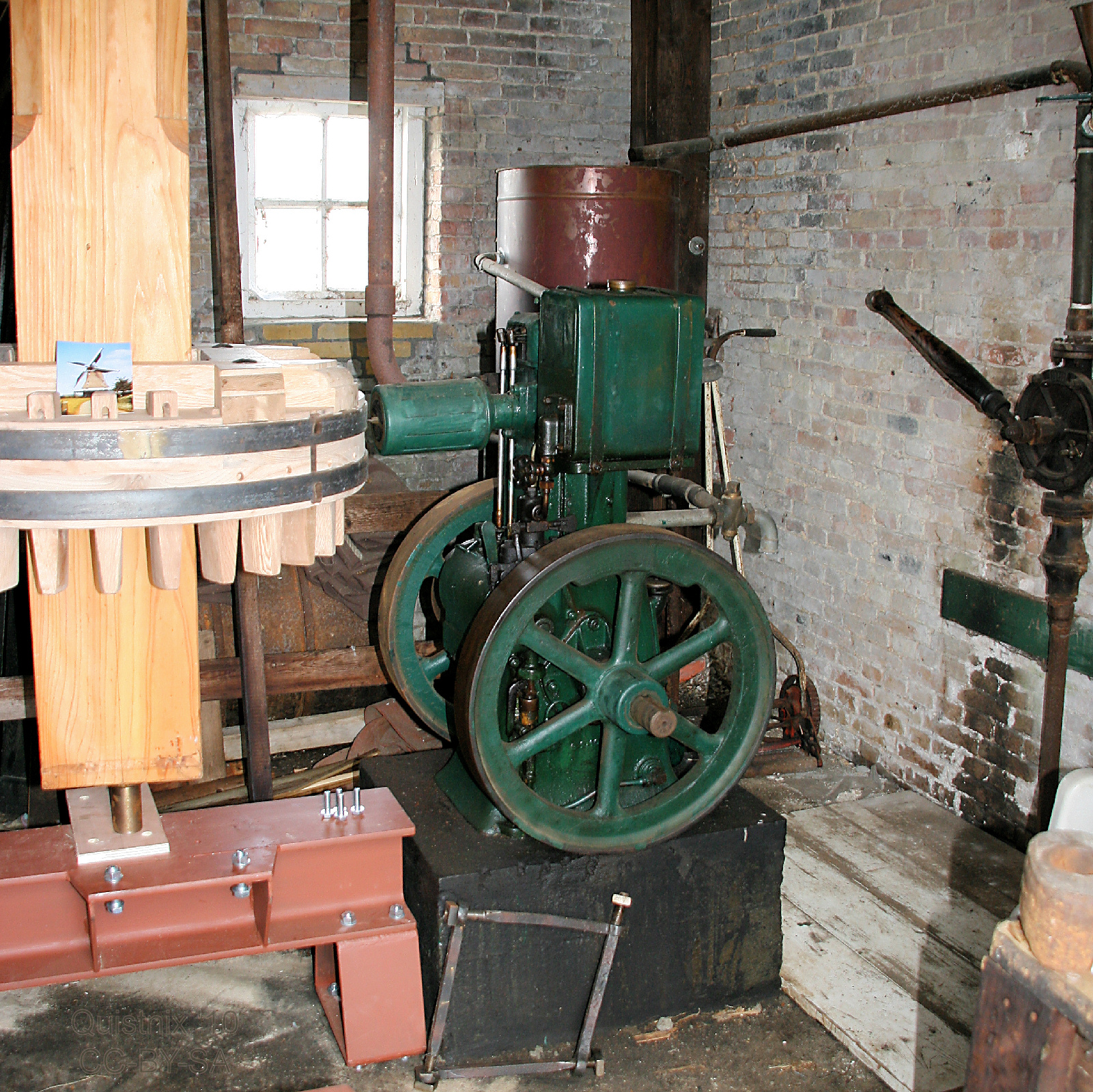 De Groene Molen - dieselmotor en koningsspil